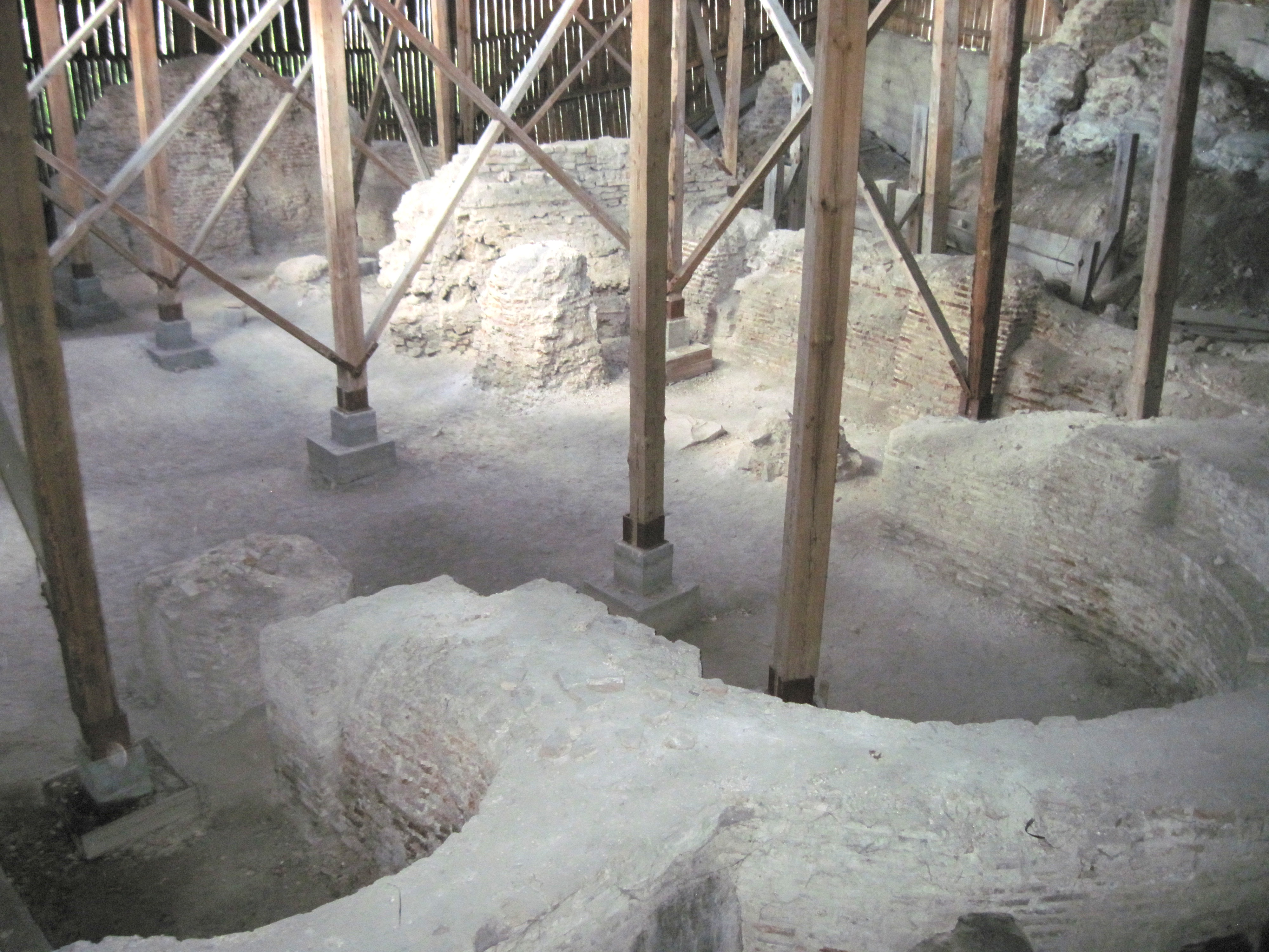 Ніжняя царква ў Гродне, Стары замак